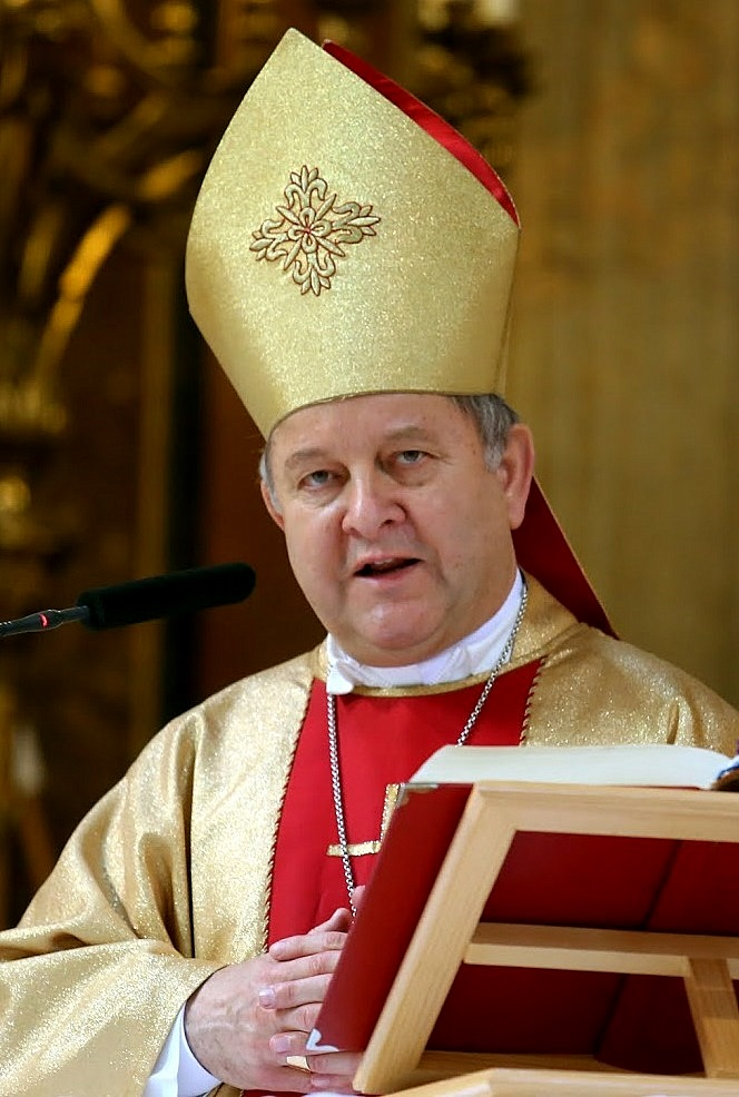 Bábel Balázs püspök, 2014